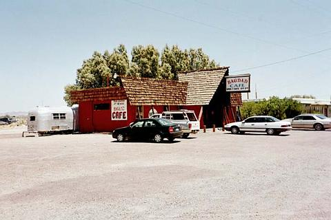 Bildbeschreibung: Bagdad Café, Newberry Springs, Kalifornien Quelle: selbst fotografiert Fotograf: Shoshone Datum: Sommer 2001